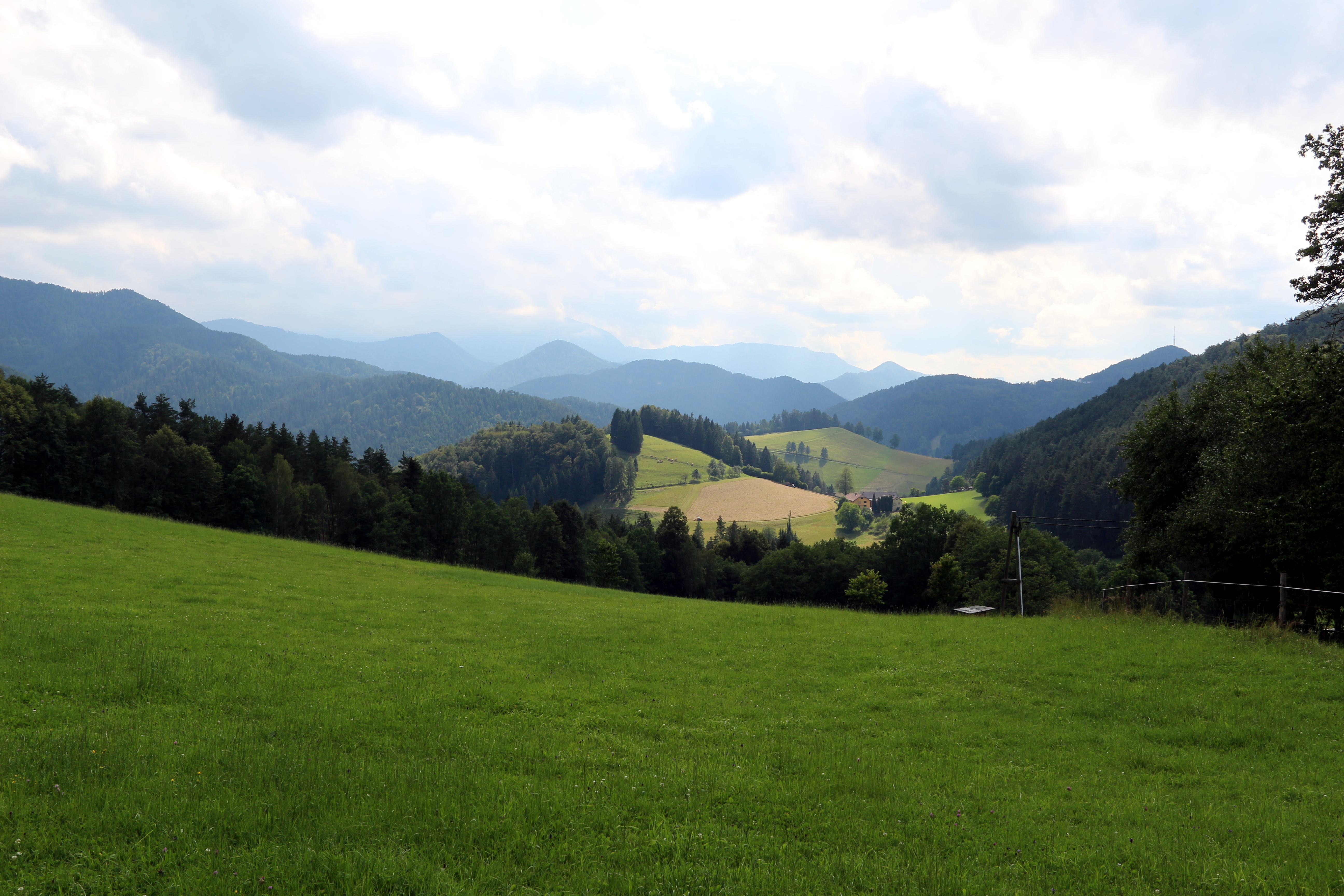 Gutensteiner Alpen in Gutestein, Niederösterreich. Gesehen vom Panoramaweg unweit des Etschenbergs.